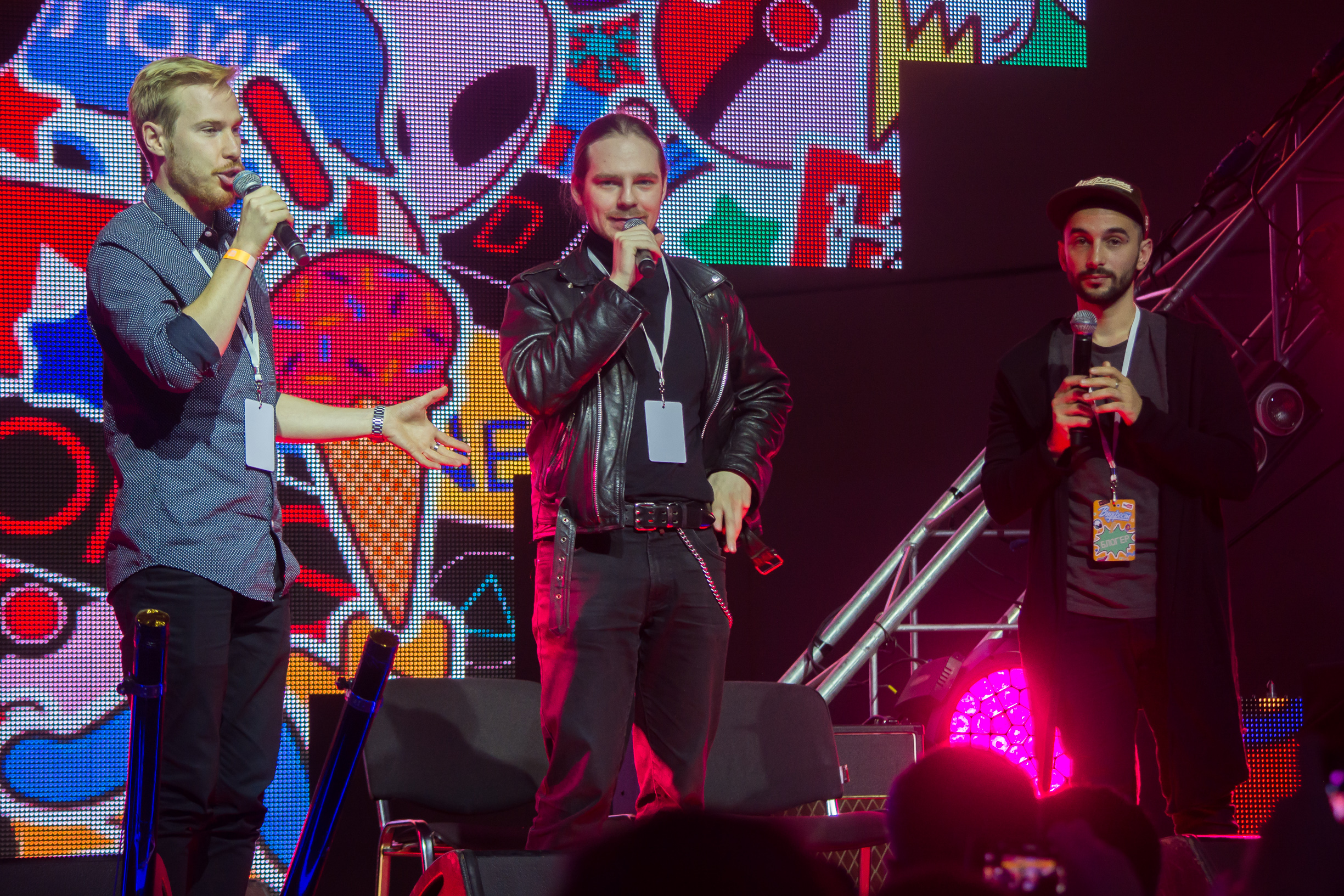 This is Хорошо на Видфест 2016 в Москве